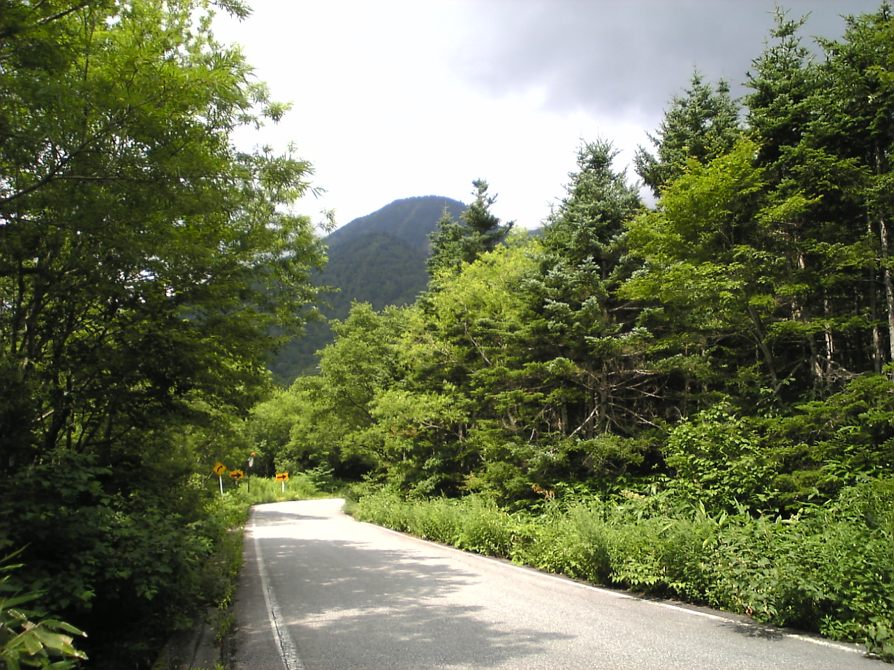 国道158号・安房峠旧区間。峠から西側へかなり下ったところ。アカンダナ山の真南。